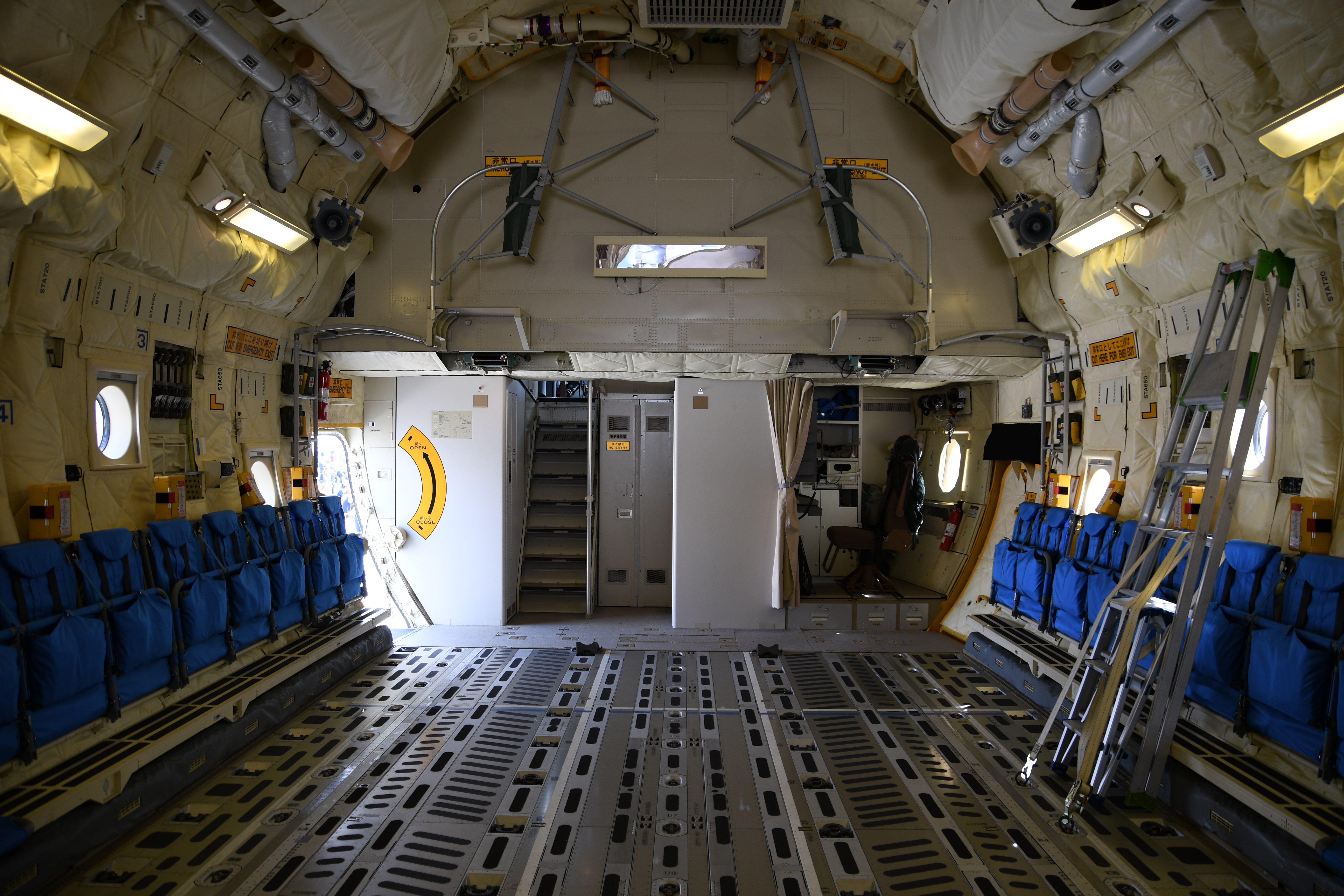 航空自衛隊 C-2輸送機（78-1205号機） 貨物室。2018年3月3日 小牧基地にて。